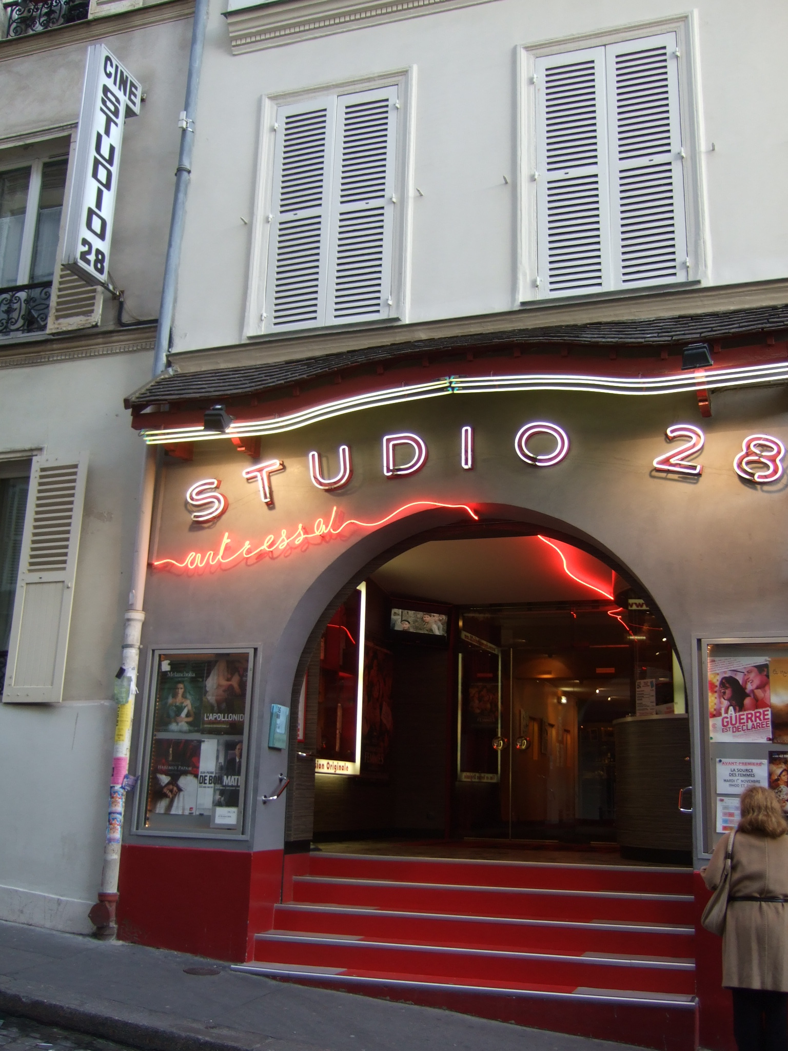 cinéma d'art et essai